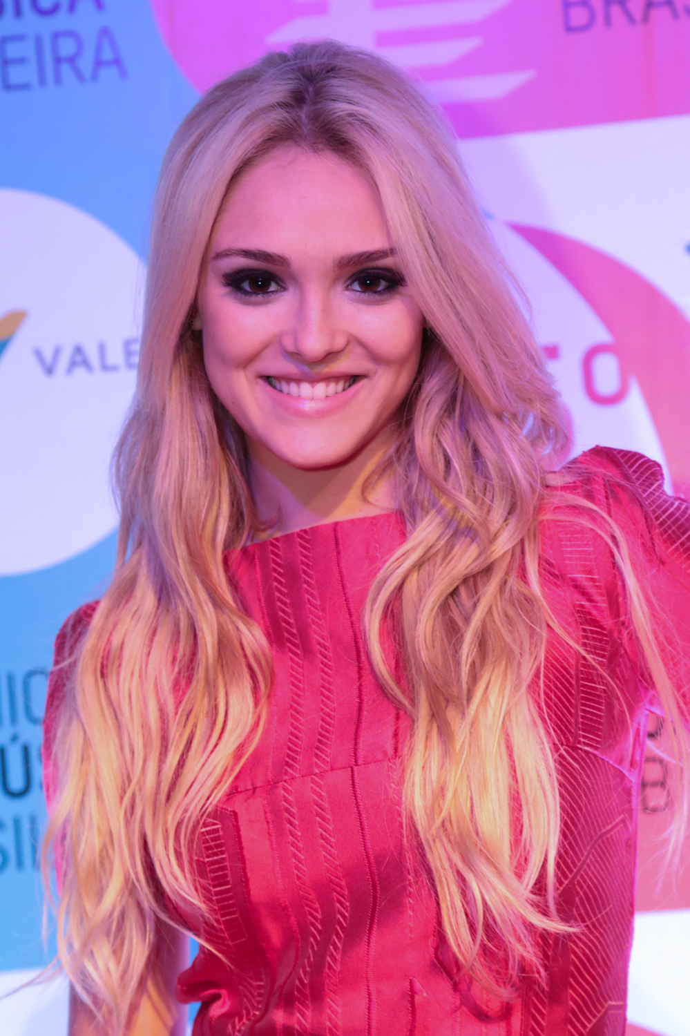 Isabelle Drummond durante o 25º Prêmio da Música Brasileira no Theatro Municipal.